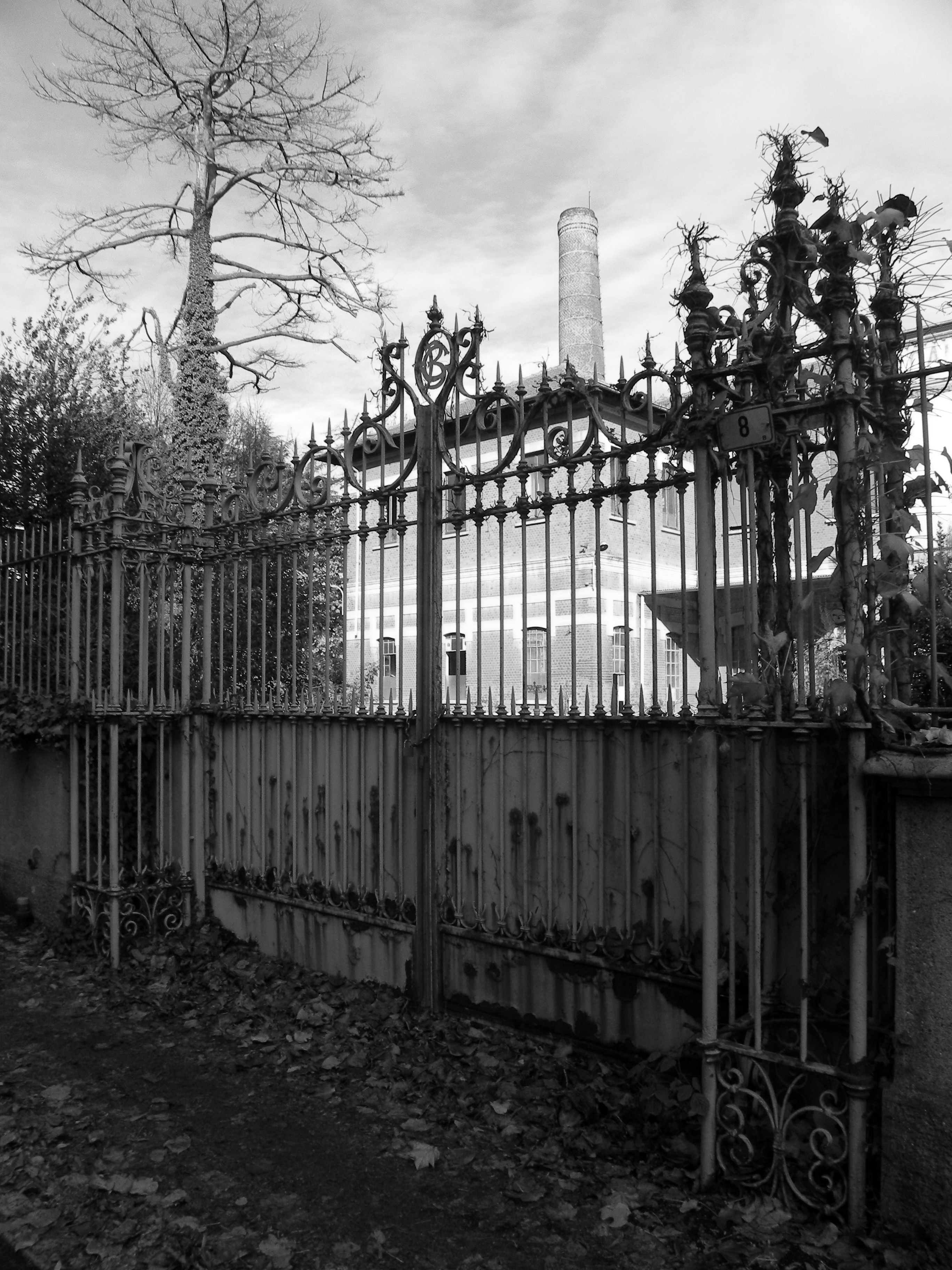 Ex calzaturificio Giuseppe Borri This is a photo of a monument which is part of cultural heritage of Italy.